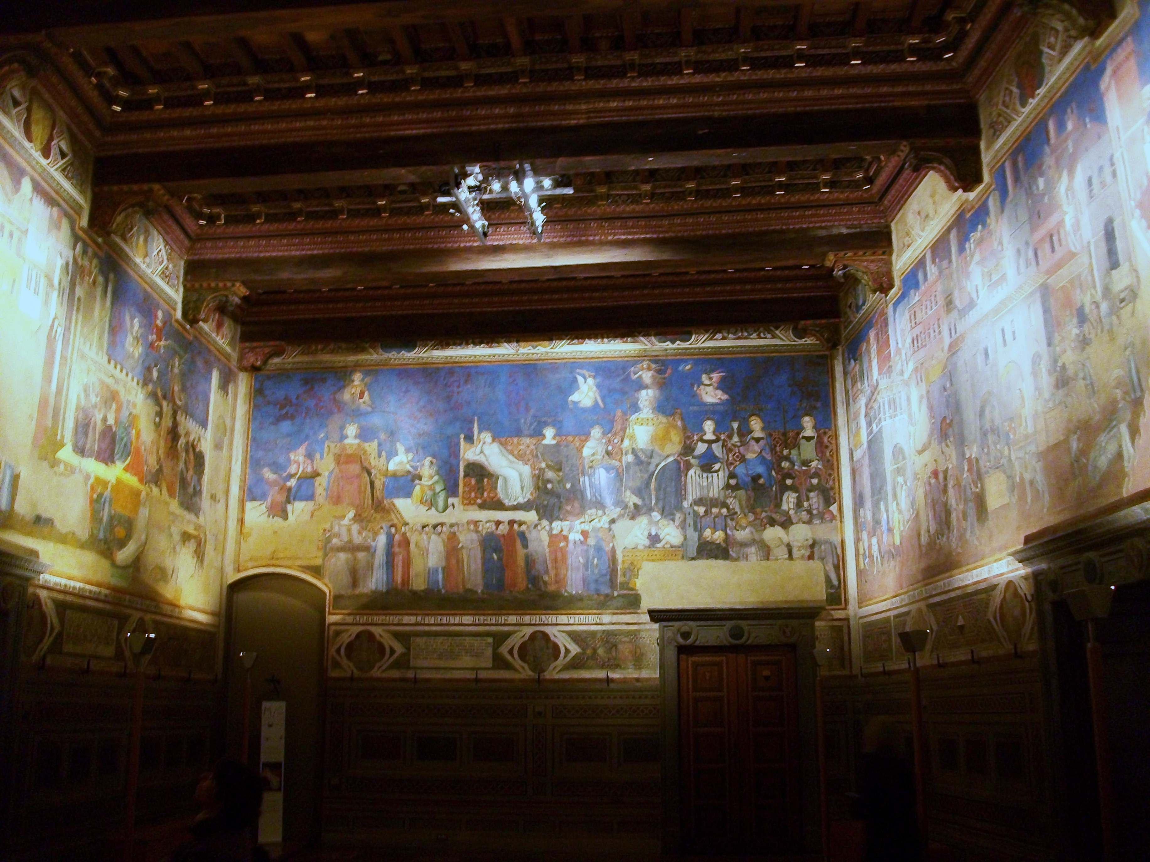 Sala amb frescos d'Ambrogio Lorenzetti, Palazzo Pubblico de Siena.